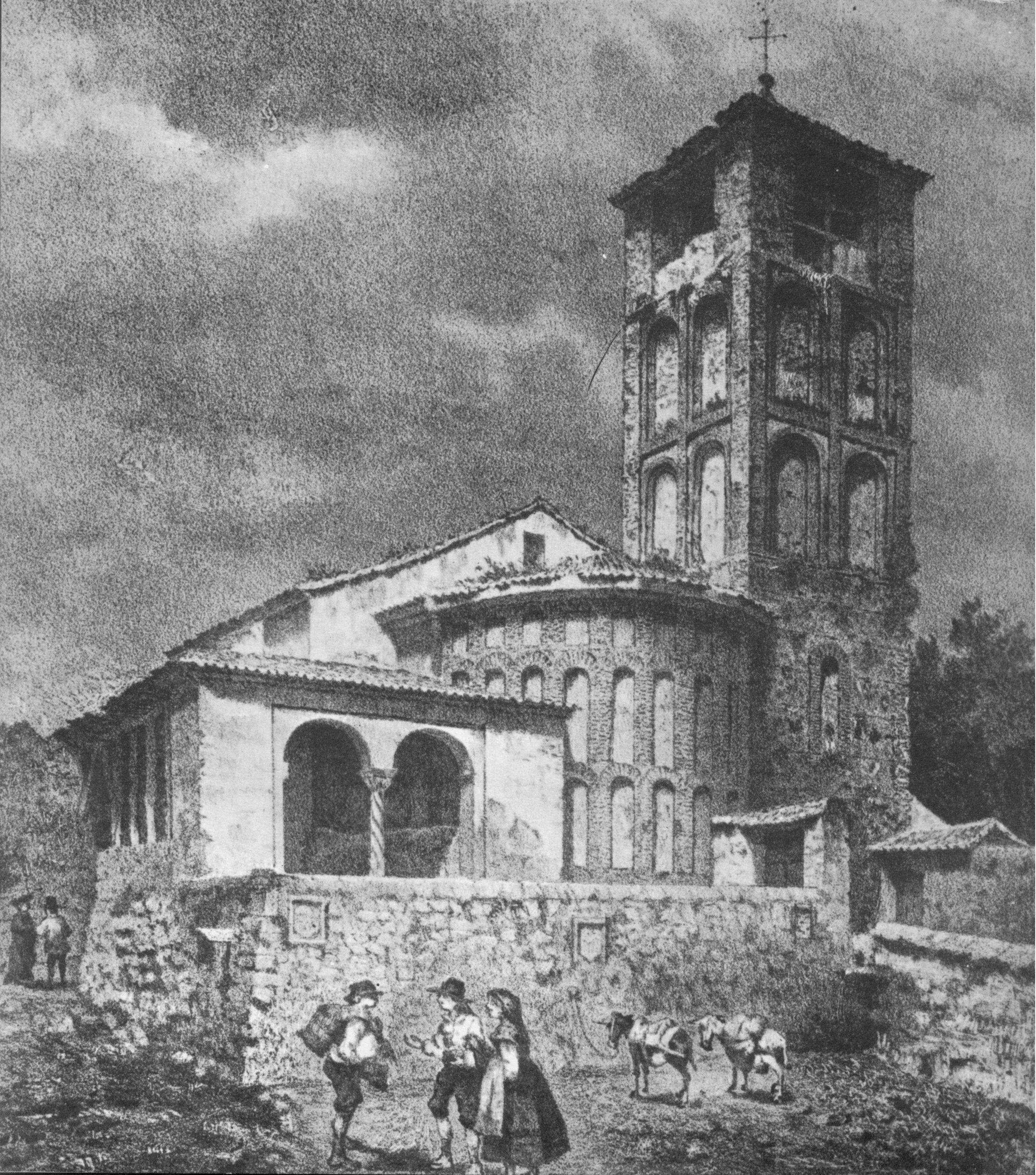 Dibujo de la desaparecida iglesia de Santa Marina de Cuéllar, realizado por el pintor Francisco Javier Parcerisa en el año 1865.